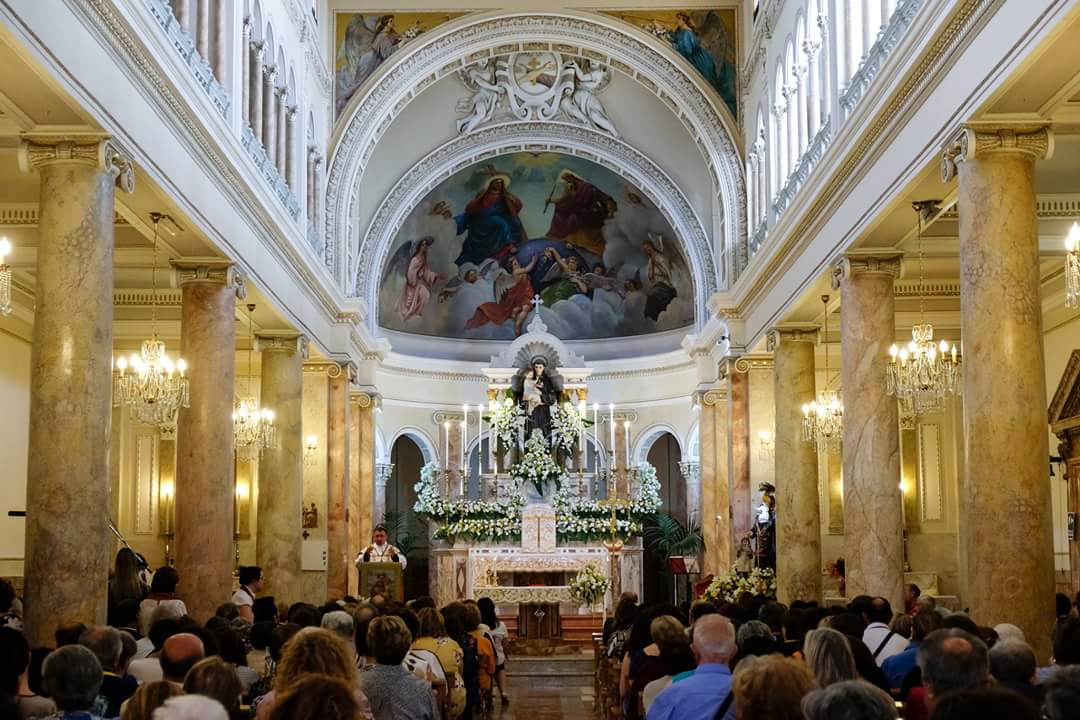 Interno della chiesa di sant'antonio.